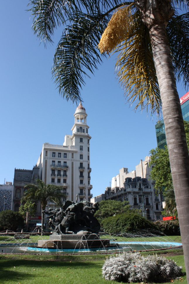 Plaza del Entrevero (Plaza Fabini). Avda. 18 de Julio entre Río Negro y Julio Herrera y Obes. (en el fondo, Edificio Rex). Montevideo.